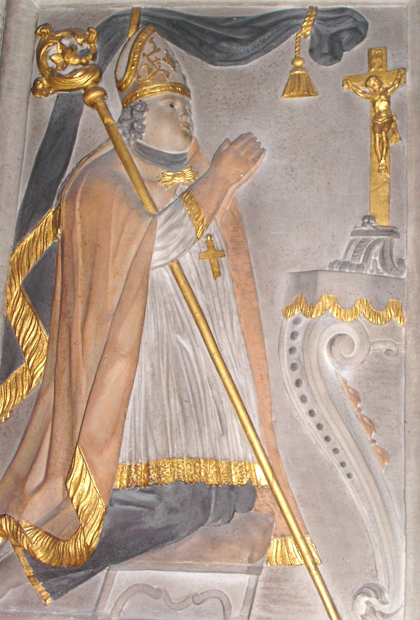 Johann Anton Wallreuther, Weihbischof von Worms (+1734), Portrait vom Epitaph, Worms, Liebfrauen